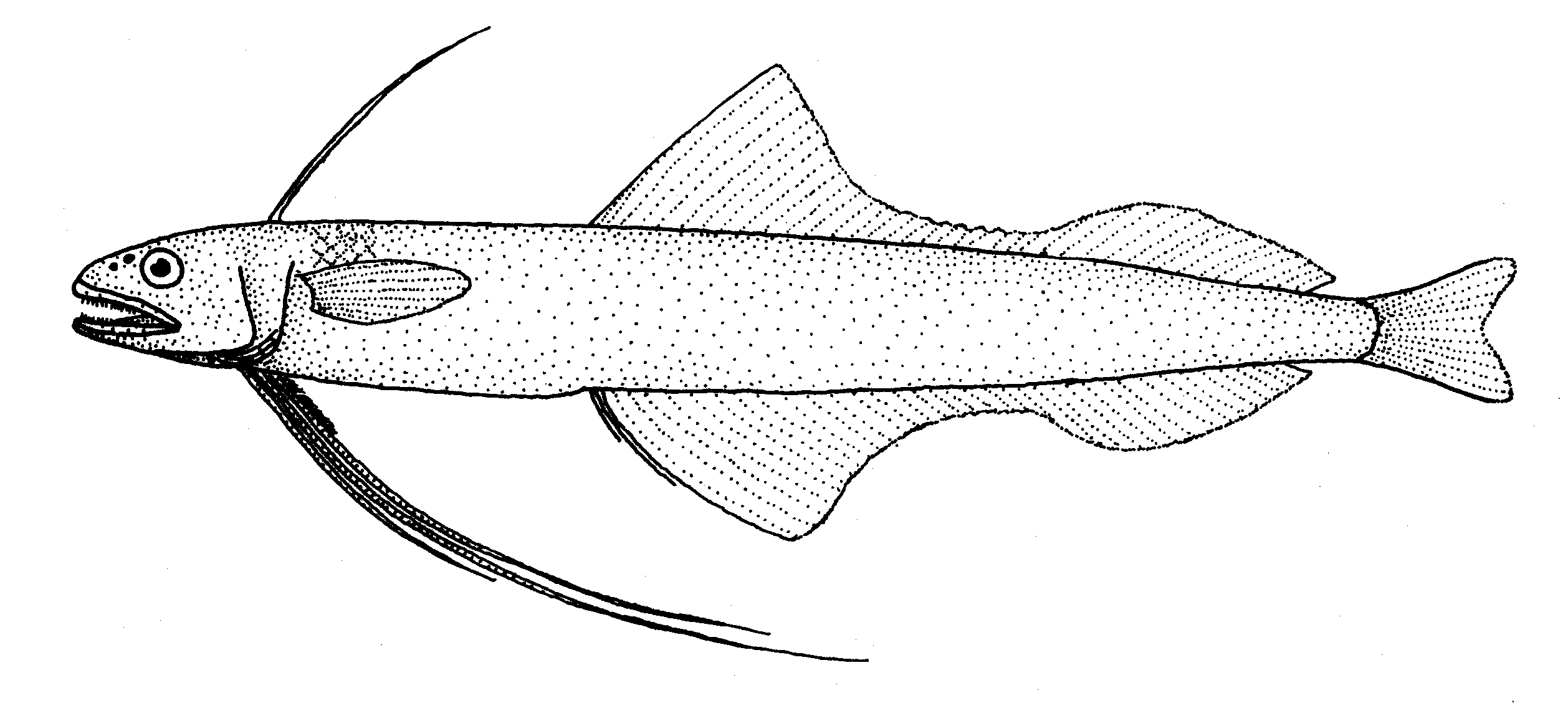 Bregmaceros mcclellandi (Spotted codlet)